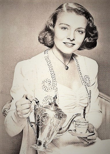 Jane Bryan